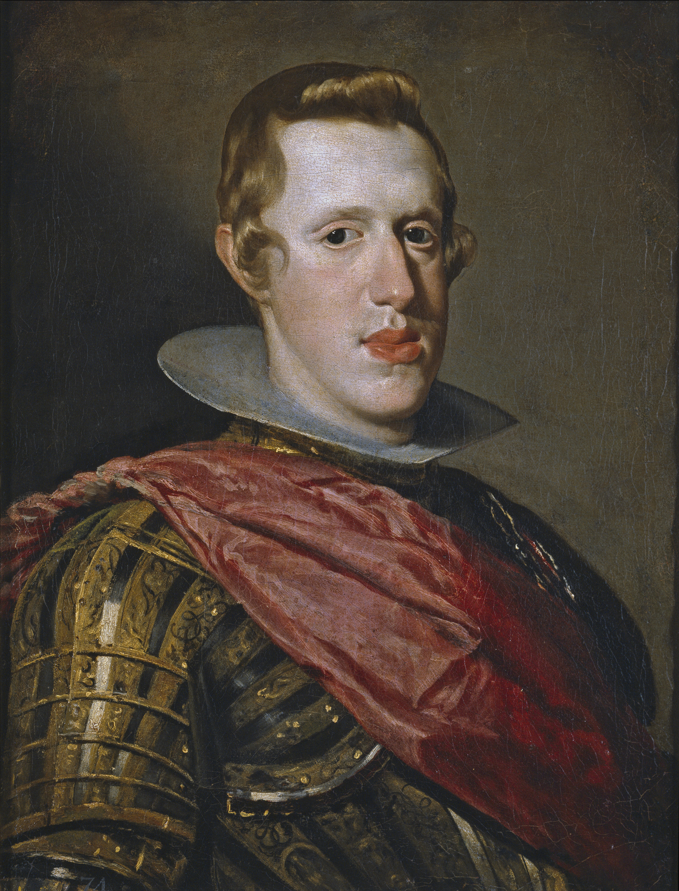 Retrato del rey Felipe IV de España (1601-1665), que fue hijo del rey Felipe III de España y de la reina Margarita de Austria.